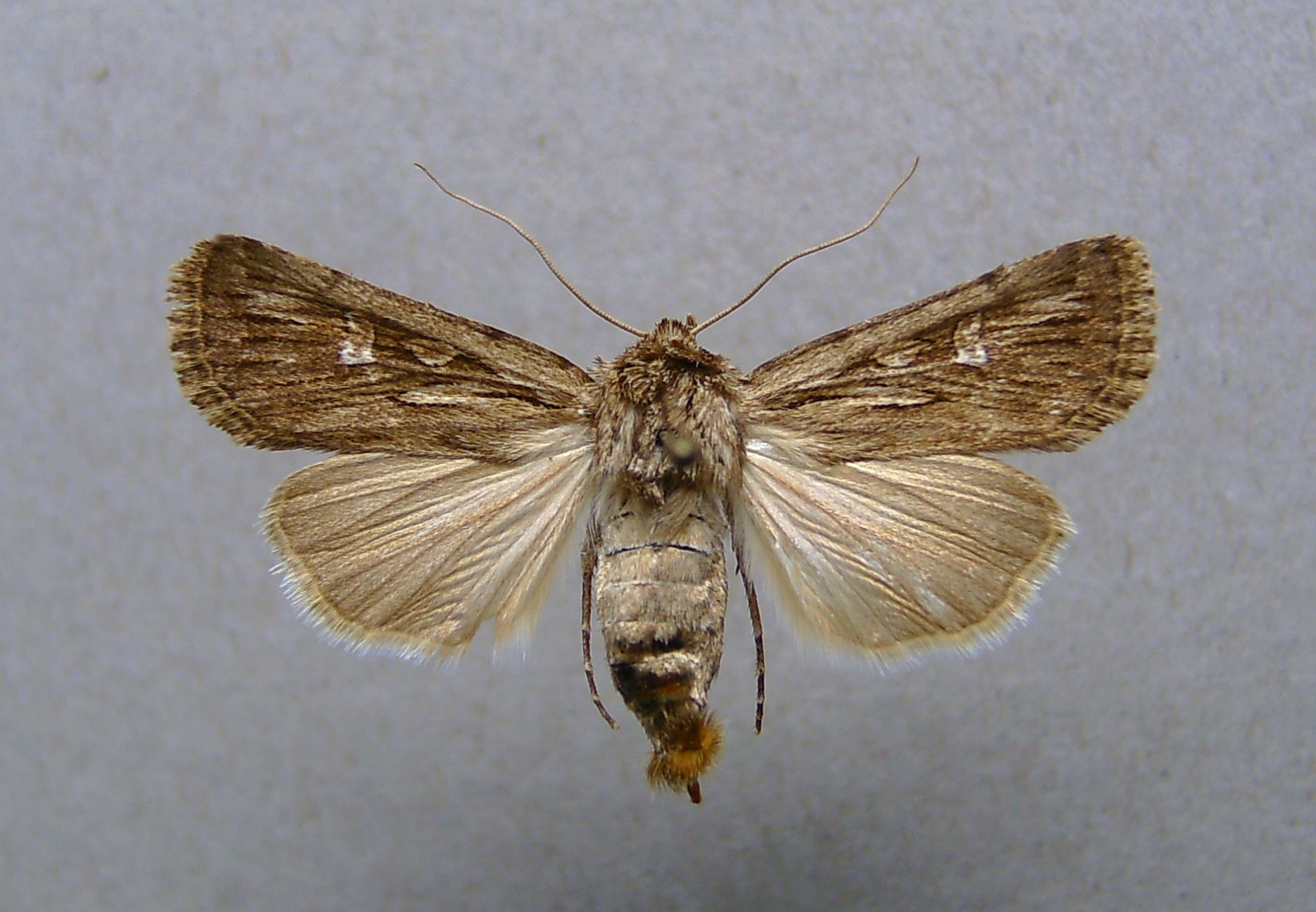 Dichagyris forcipula amasicola, Ağrı, Türkei